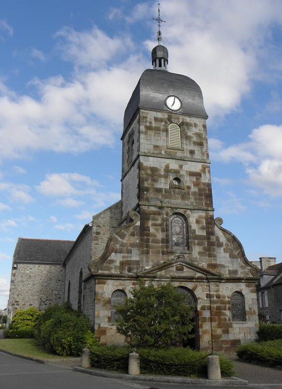 Extérieur de l'église Saint-Nicolas au Vivier-sur-Mer (35).